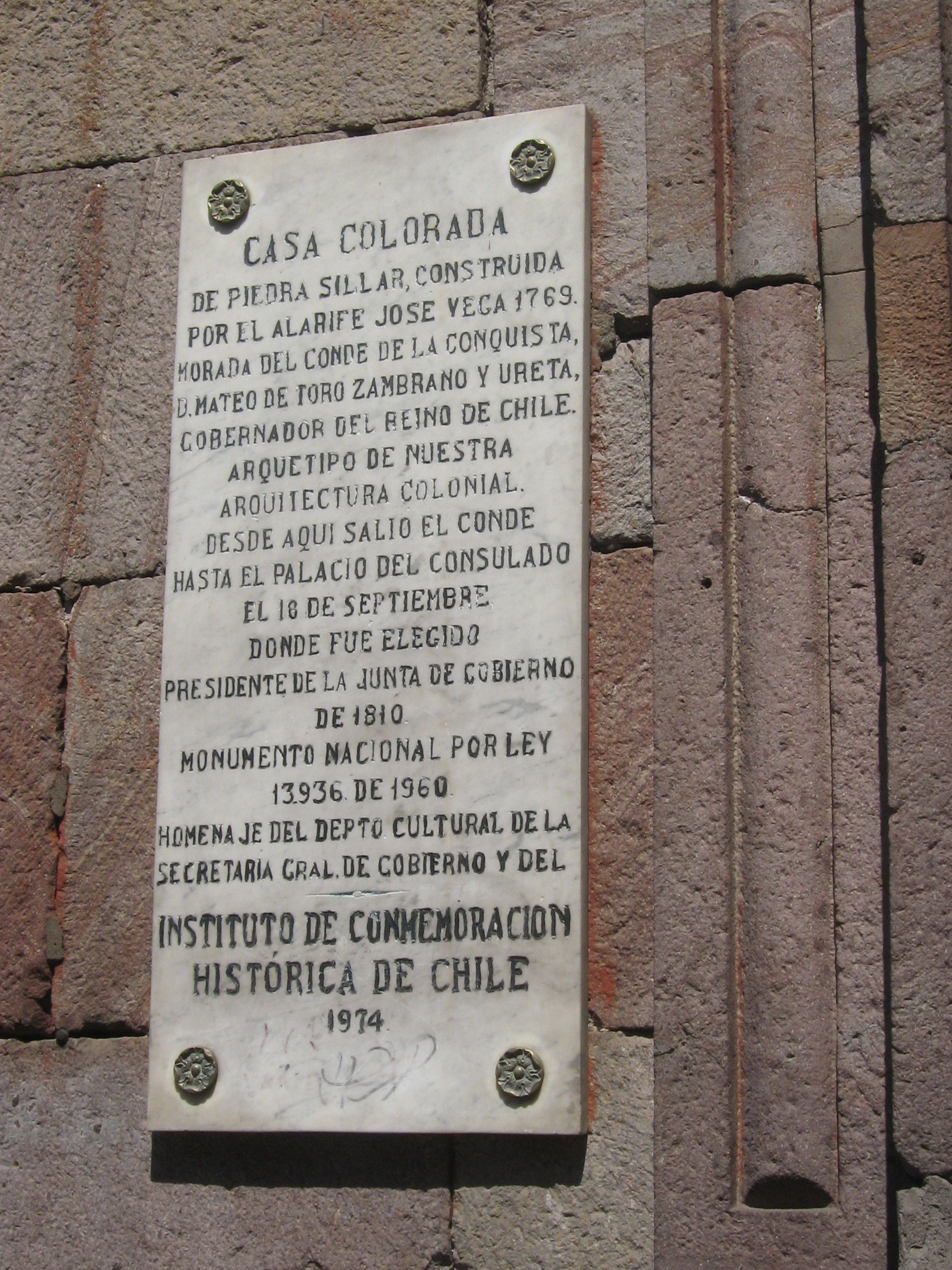 Casa Colorada, Instituto de conmemoración Histórica